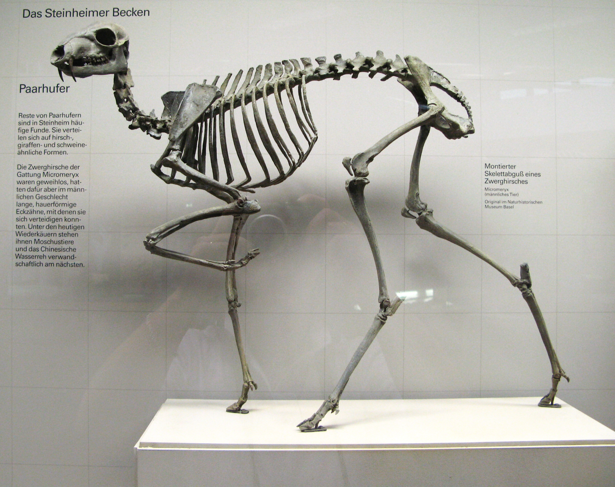 Zwerghirsch (Micromeryx), männliches Exemplar, Skelett - aufgenommen im Museum am Löwentor, Stuttgart